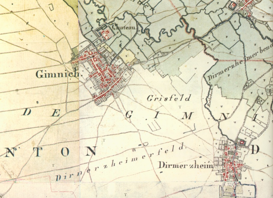 Kartenaufnahme der Rheinlande, Jean Joseph Tranchot und von Müffling 1803-1820. Kartenausschnitt Gymnich um 1807